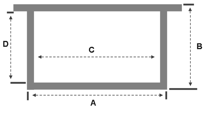 Rähmchenmaße